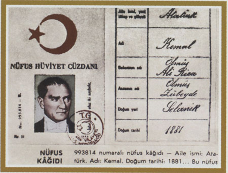 Atatürk'ün 993 814 seri numaralı nüfus cüzdanı